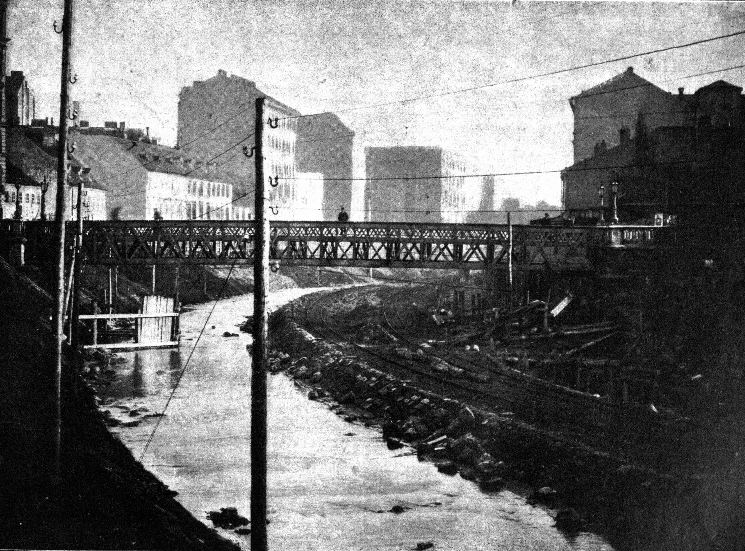 Wien, Magdalenenbrücke im Jahr 1897